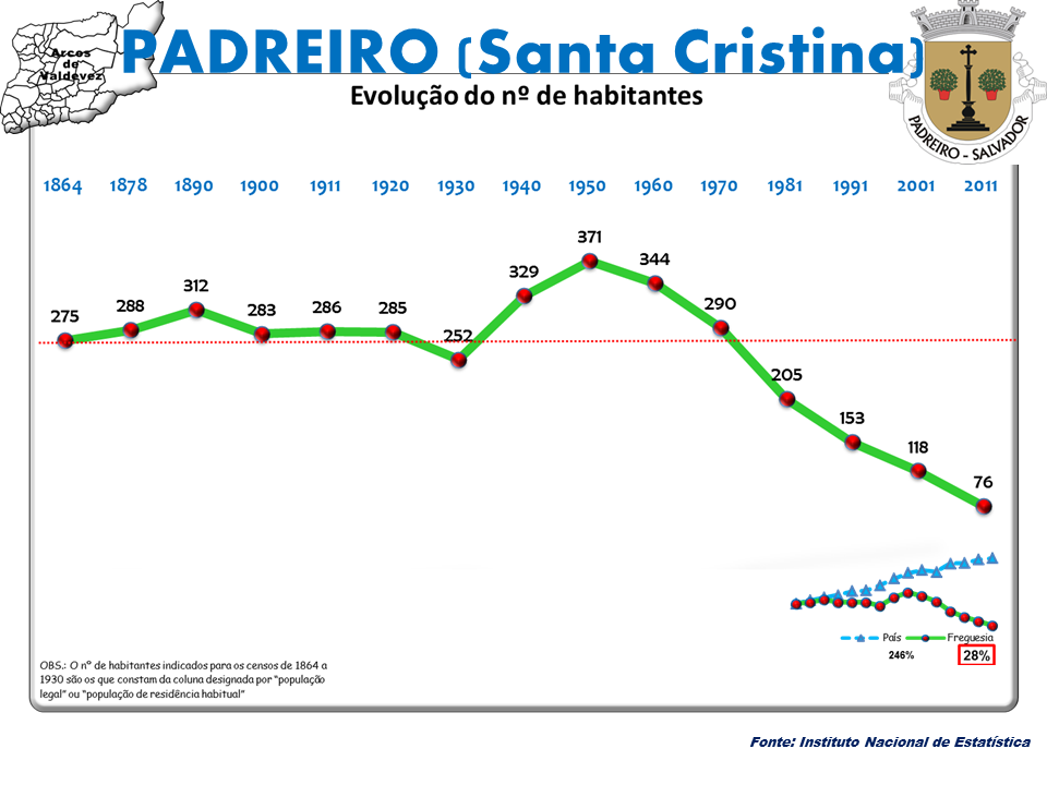 Censos 1864/2011